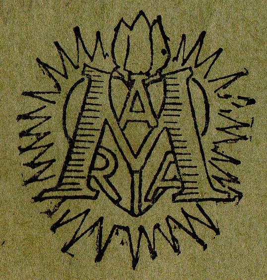 Symbol MARIA.